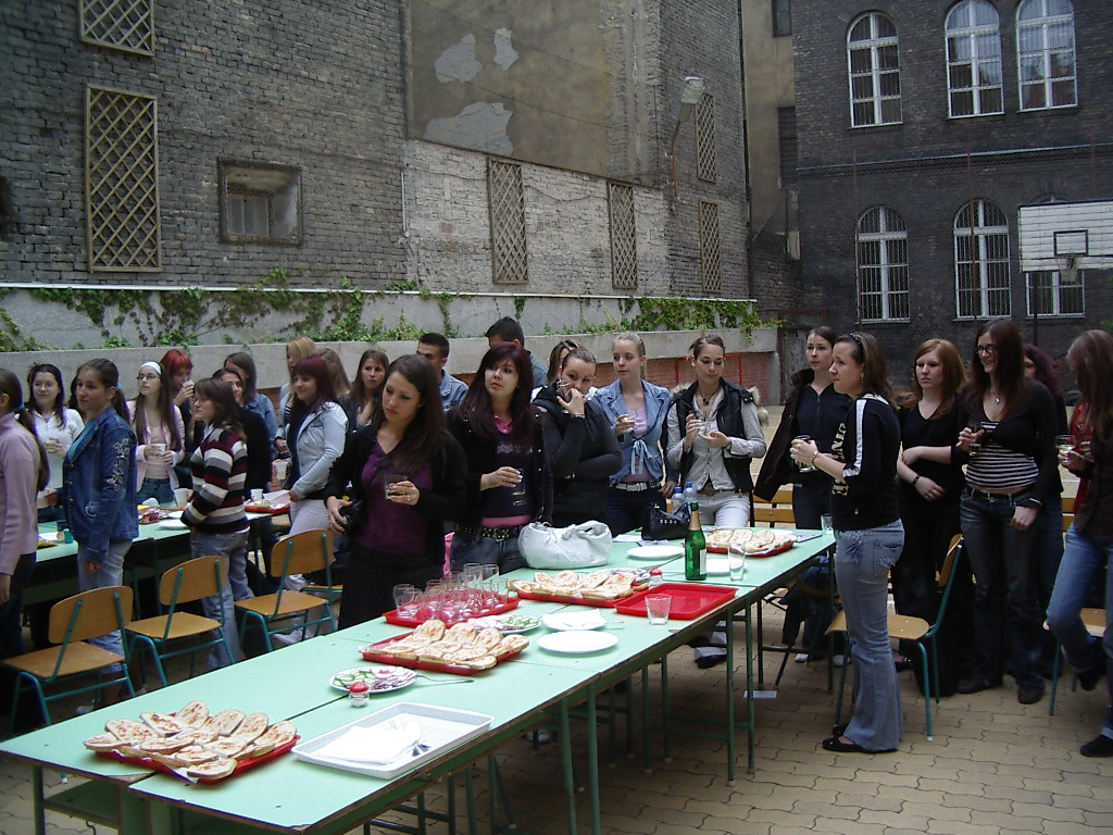 Az utolsó szerenád a Hajnik Károly Közgazdasági Szakközépiskolában (Budapest, VII.)